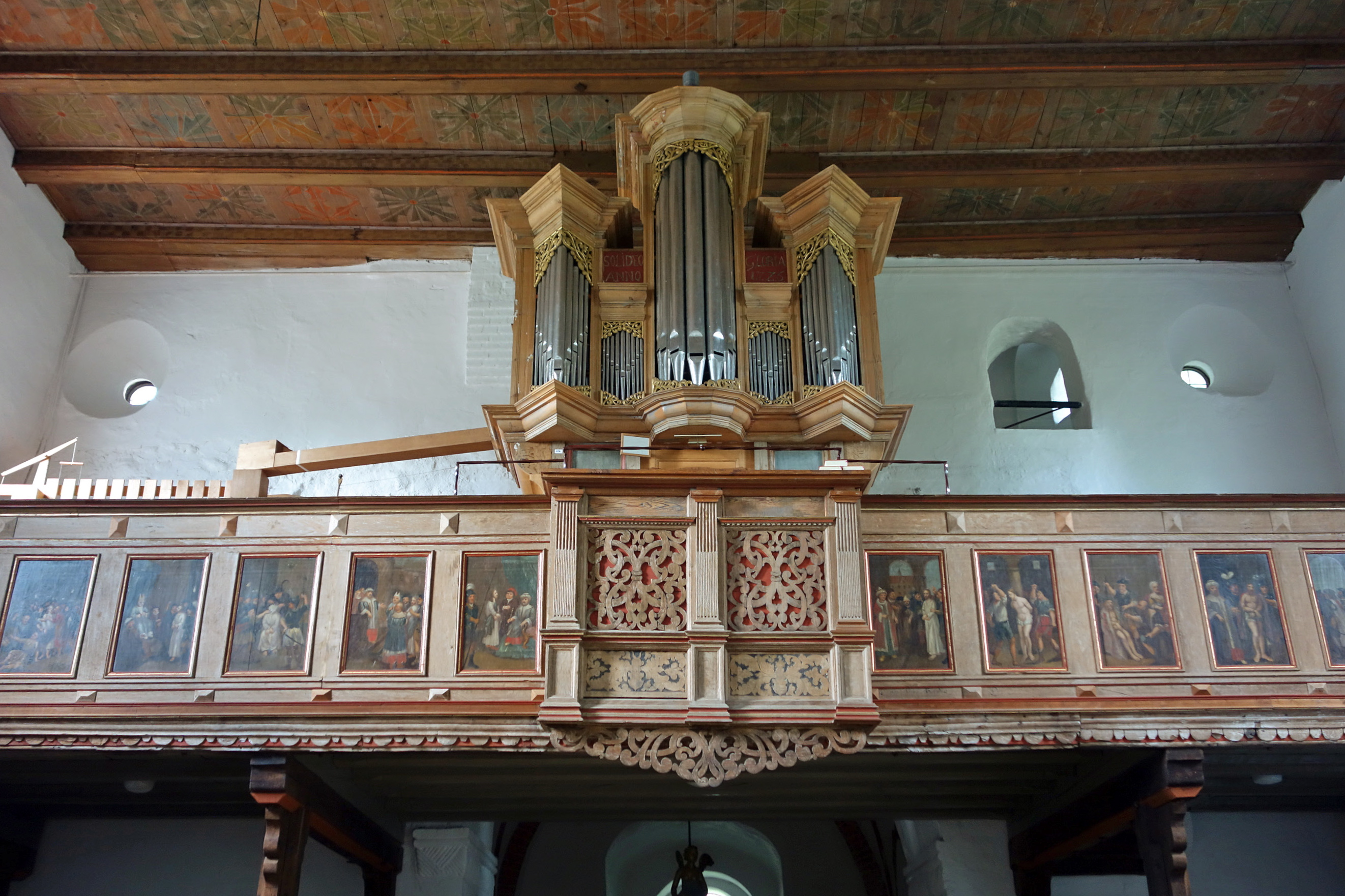 Orgel von St. Johannis, Neukirchen bei Malente, Schleswig-Holstein